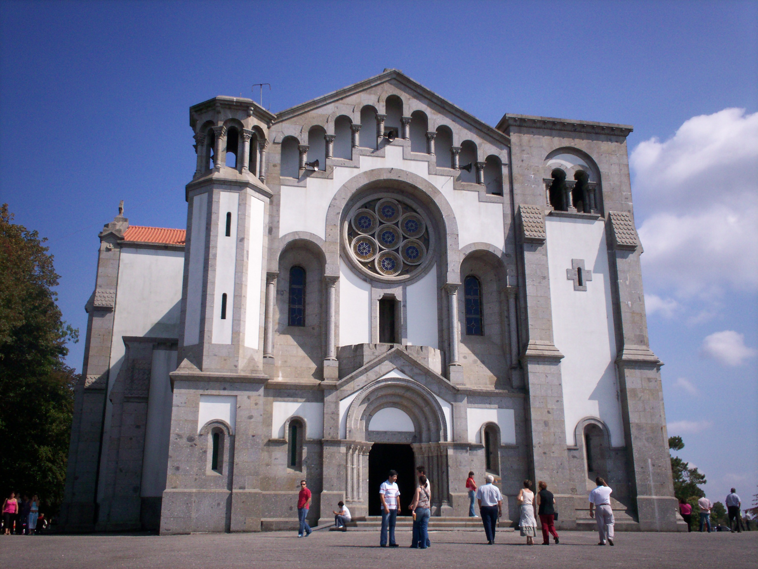 Basílica de Nossa Senhora da Assunção em Santo Tirso, Portugal